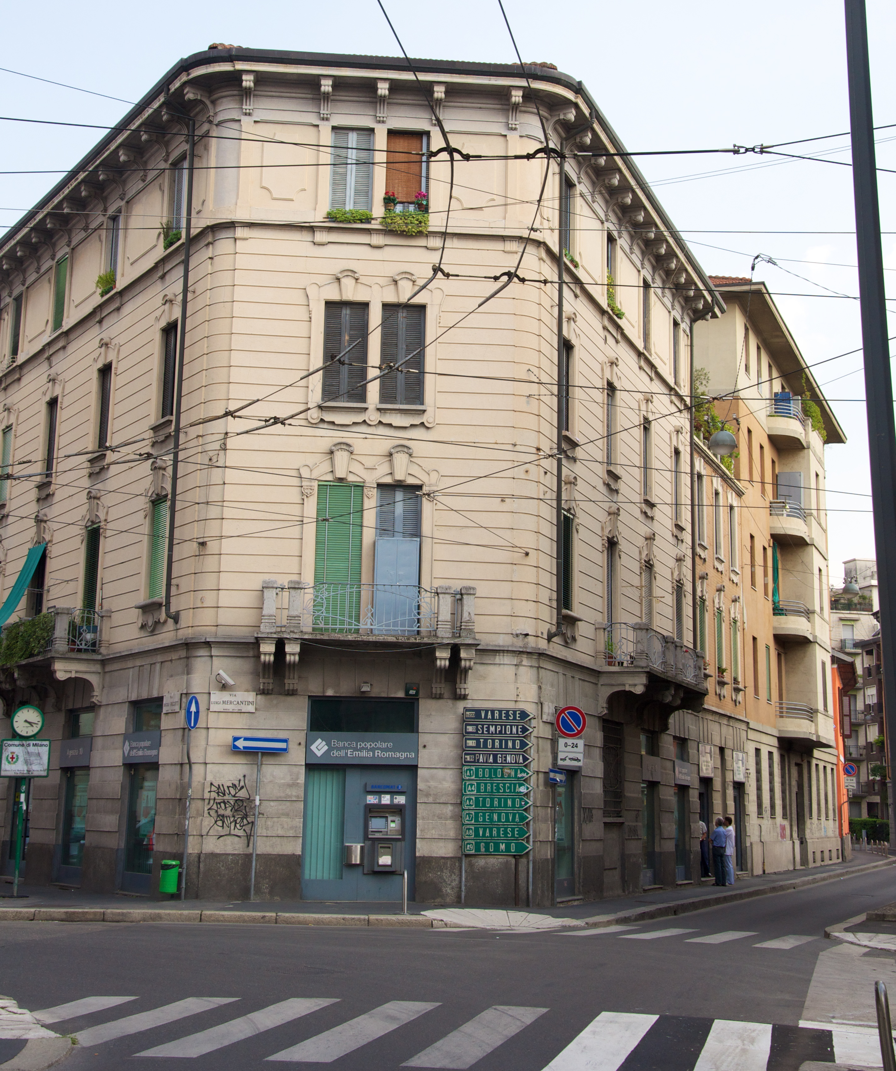 Quartiere Bovisa di Milano, incrocio caratteristico